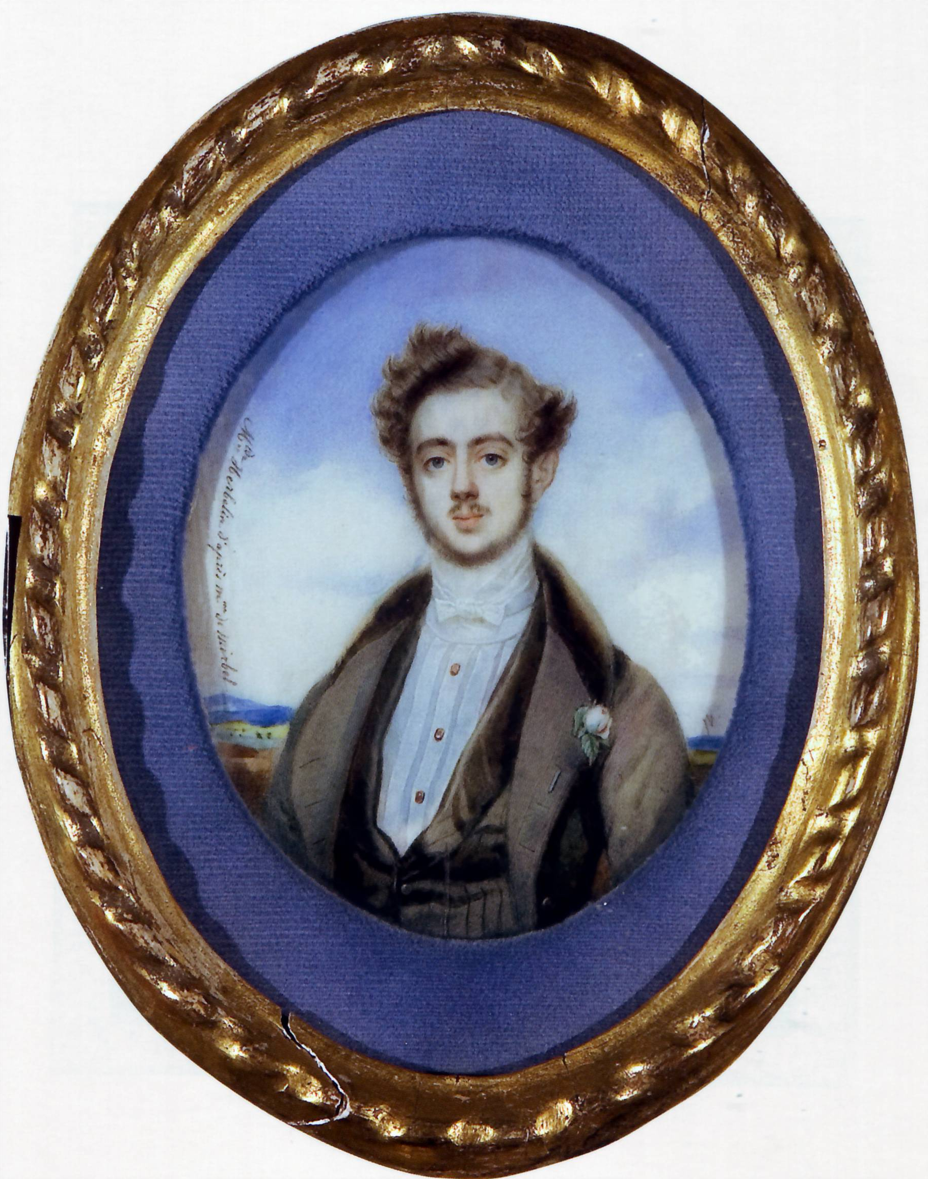 Портрет А. Демидова. Коллекция Подстаницких / Sign. : Mme Herbelin d'après Mme de Mirbel.